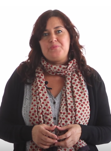 En este vídeo, nuestra diputada Auxiliadora Honorato nos cuenta nuestras 113 medidas para que los contratos públicos no sean carne de corrupción, opacidad e injusticia.